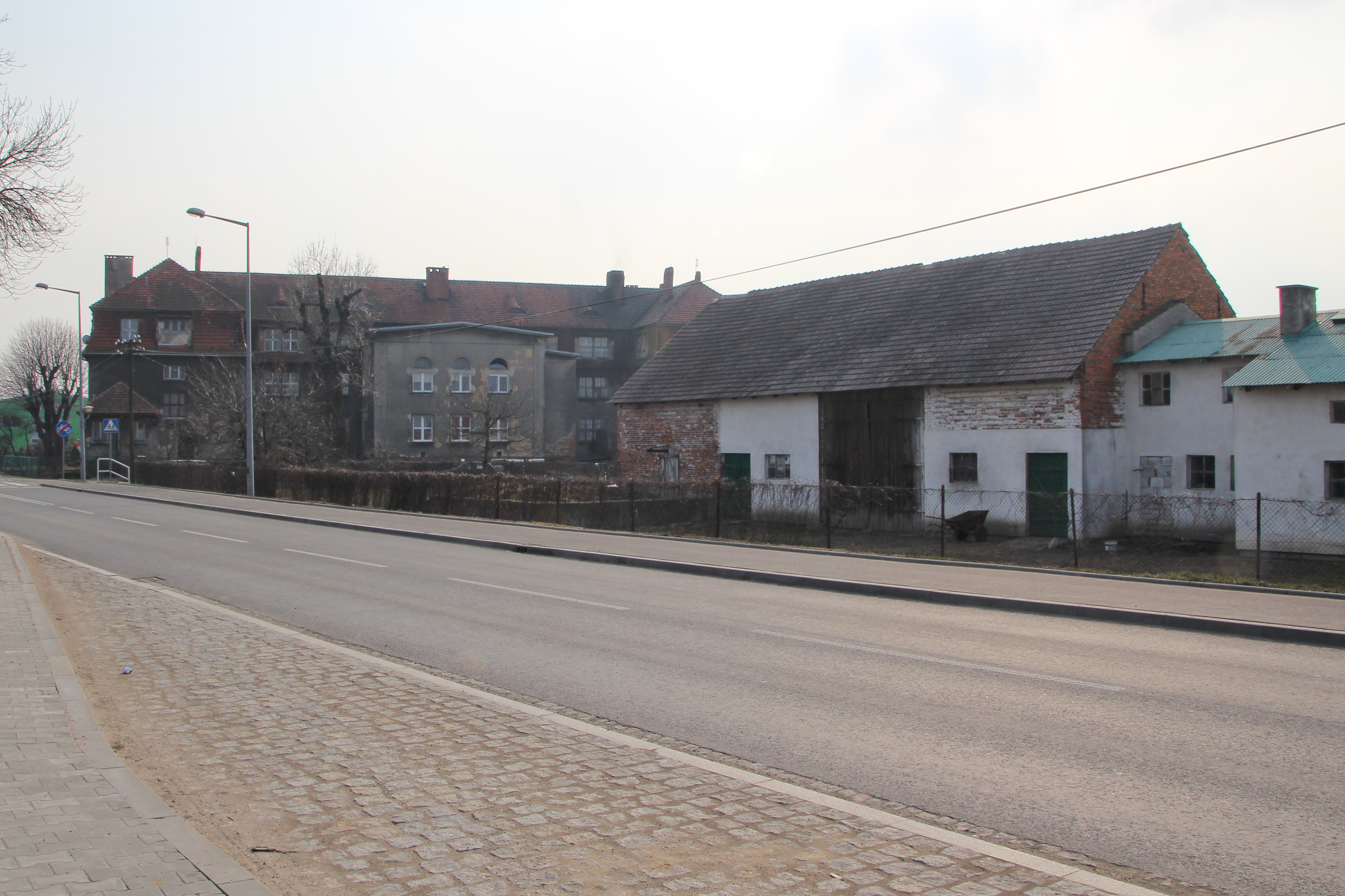 Nowa Wieś Mała – wieś w Polsce, w województwie opolskim, w powiecie brzeskim, w gminie Grodków.